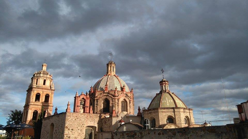 Cúpulas del Templo